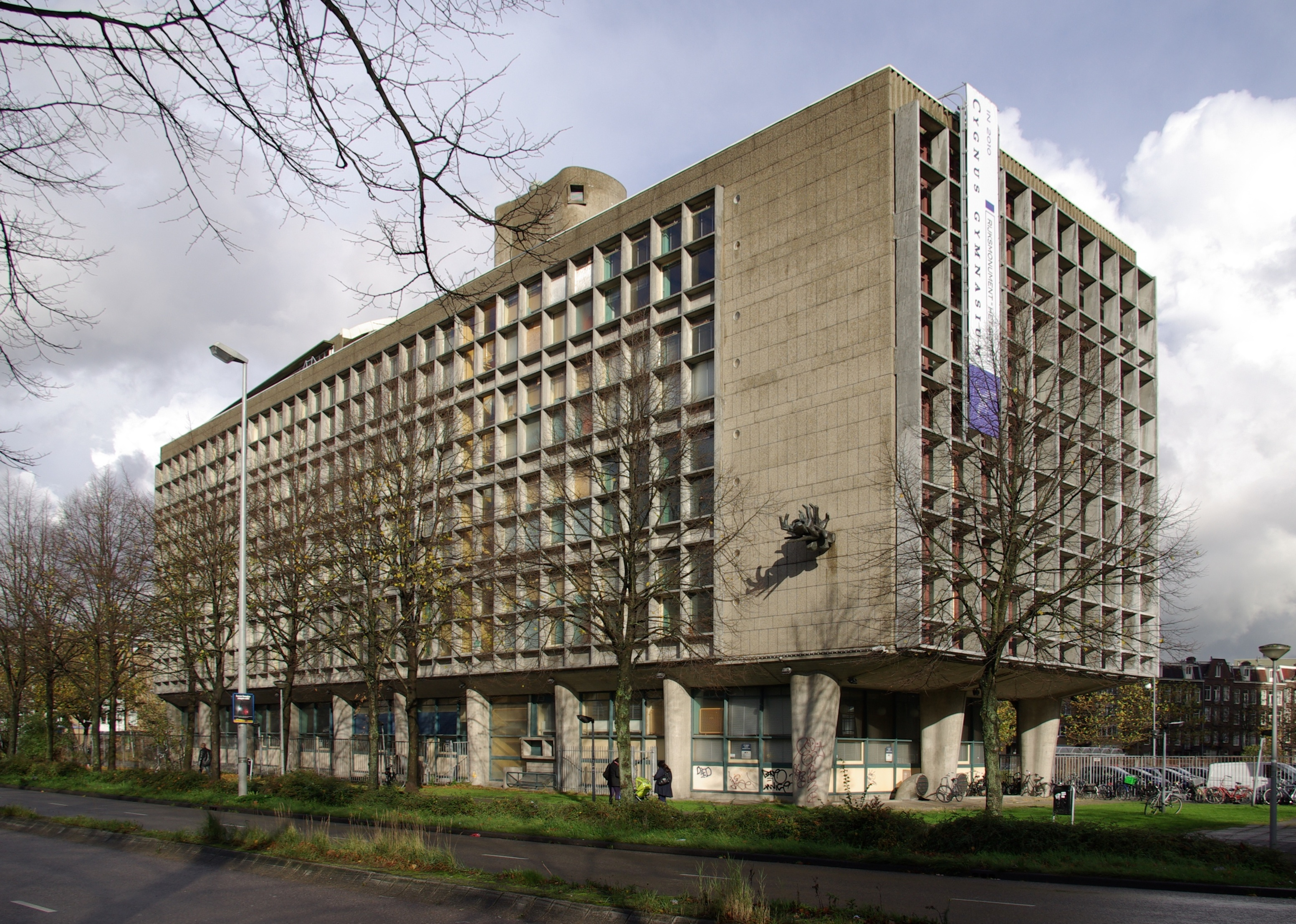 Voormalig schoolgebouw LTS/Patrimonium in de Vrolikstraat (Wibautstraat) in Amsterdam